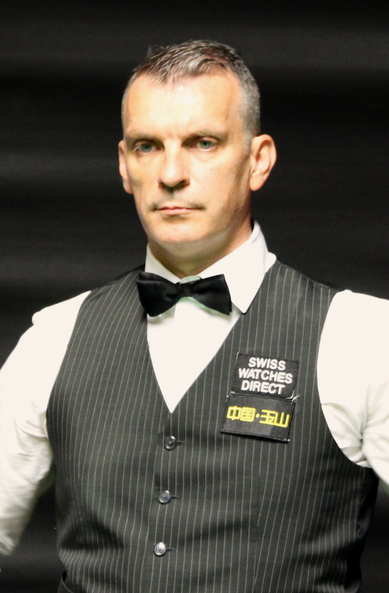 Mark Davis beim Paul Hunter Classic 2016